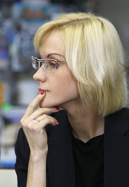 Руководитель LiveJournal Russia Светлана Иванникова